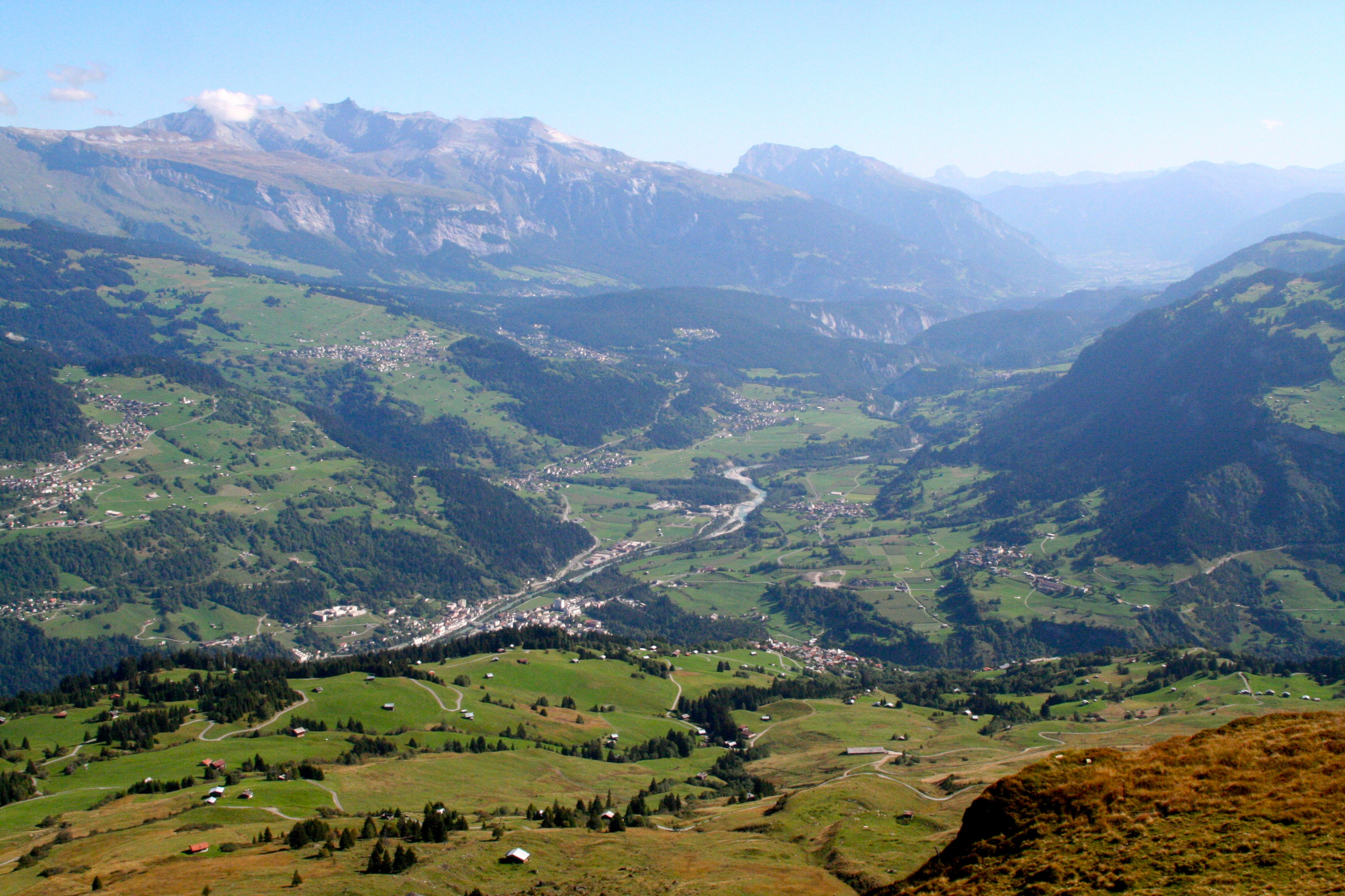 Gruob Richtung Osten, vom Piz Mundaun aus gesehen